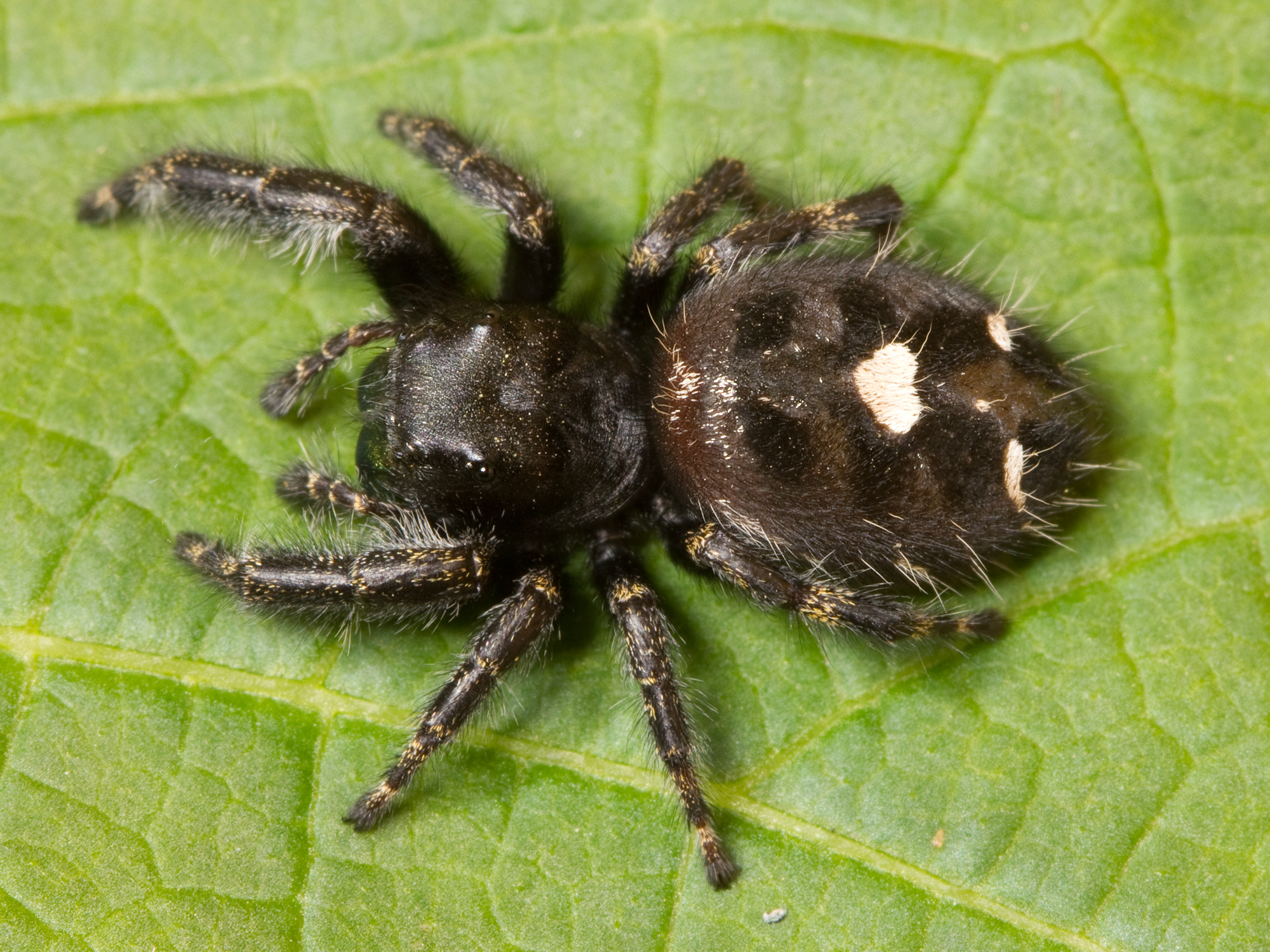 Adult female Phidippus audax jumping spider in Nashville, Tennessee